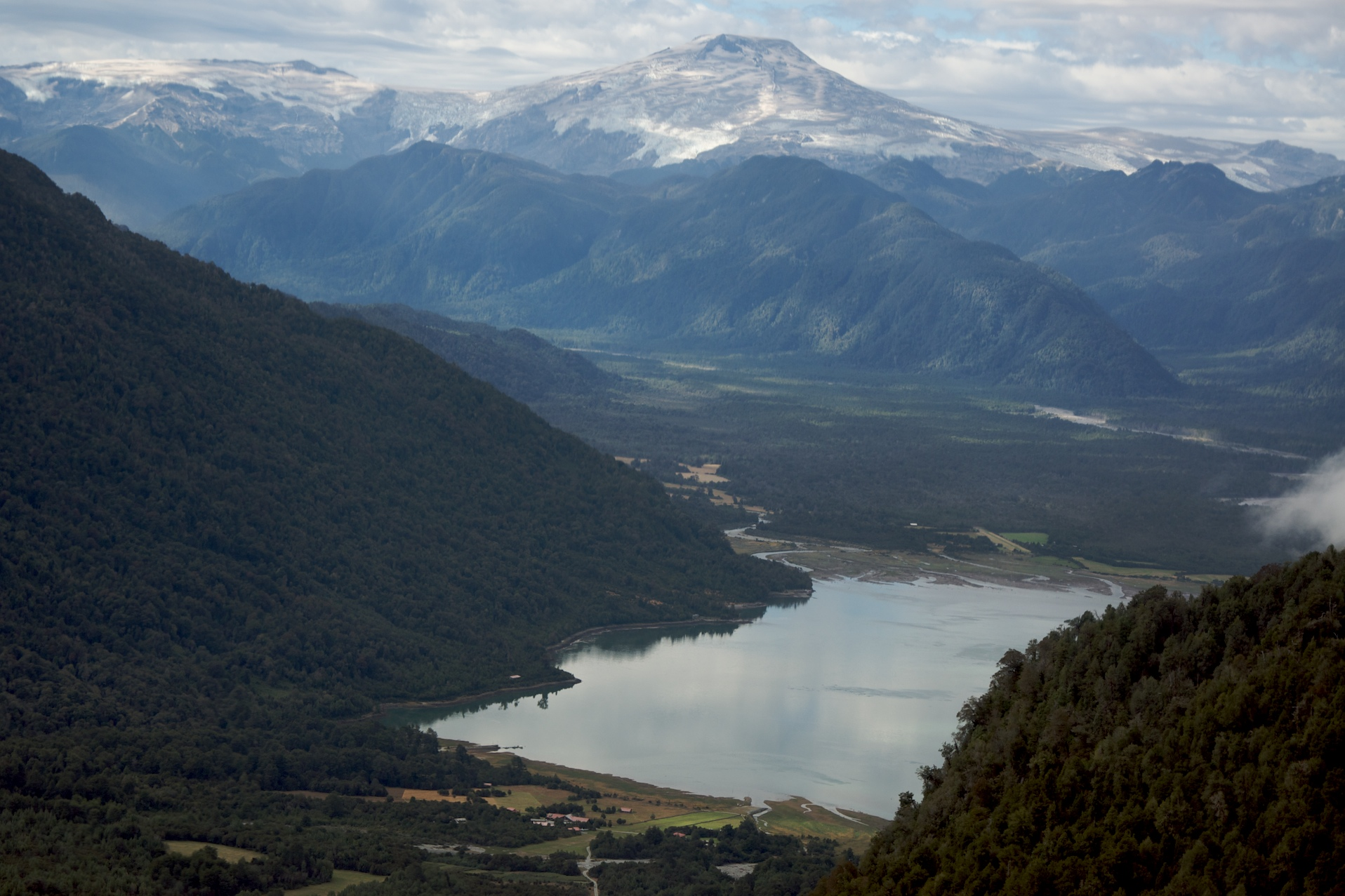 Fundos Pillán & Reñihue and Volcán Michinmahuida, with Reñihue Fjord